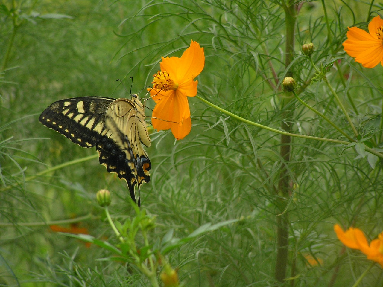 キバナコスモスとチョウ Papilio sp. on Cosmos sulphureus